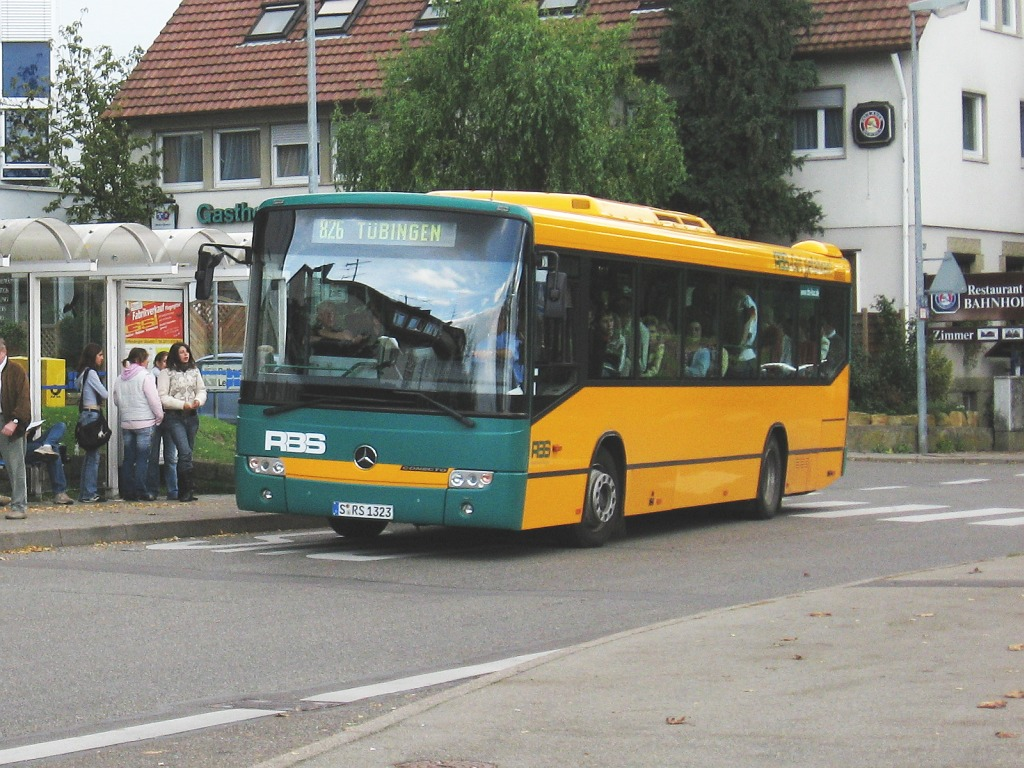 Mercedes-Benz Conecto der RBS in Leinfelden eigenes Foto (Oktober 2006) / alle Rechte freigegeben